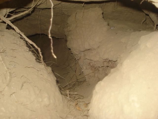 Es una foto de una madriguera del zorro situada cerca del río Tera en Aguilar de Tera (Zamora, Castilla y León).